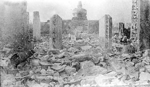 刚被焚毁后的宏仁寺